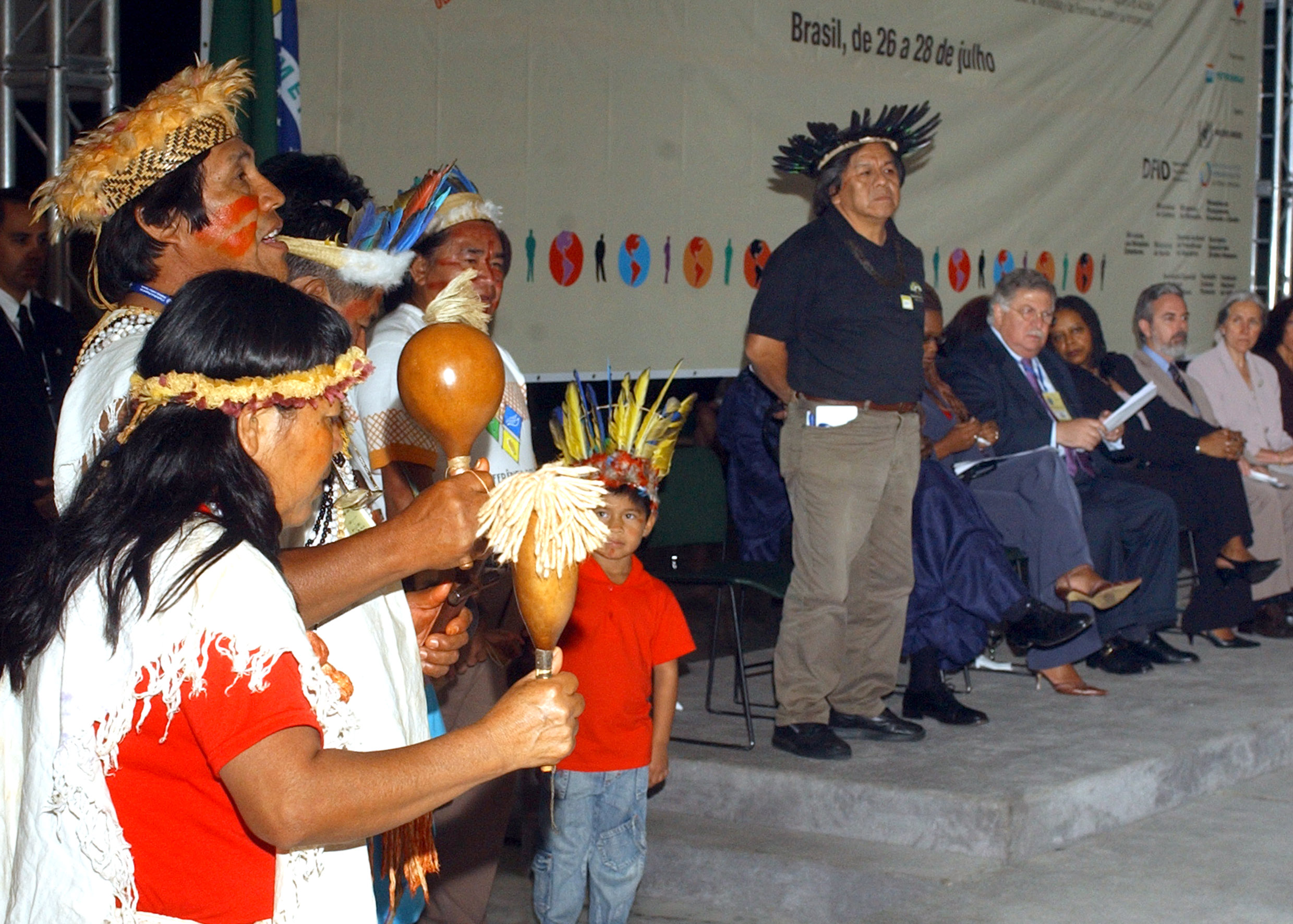 Brasília - Abertura da Conferência Regional das Américas sobre os Avanços do Plano de Ação contra o Racismo, a Discriminação Racial, a Xenofobia e Intolerâncias Correlatas